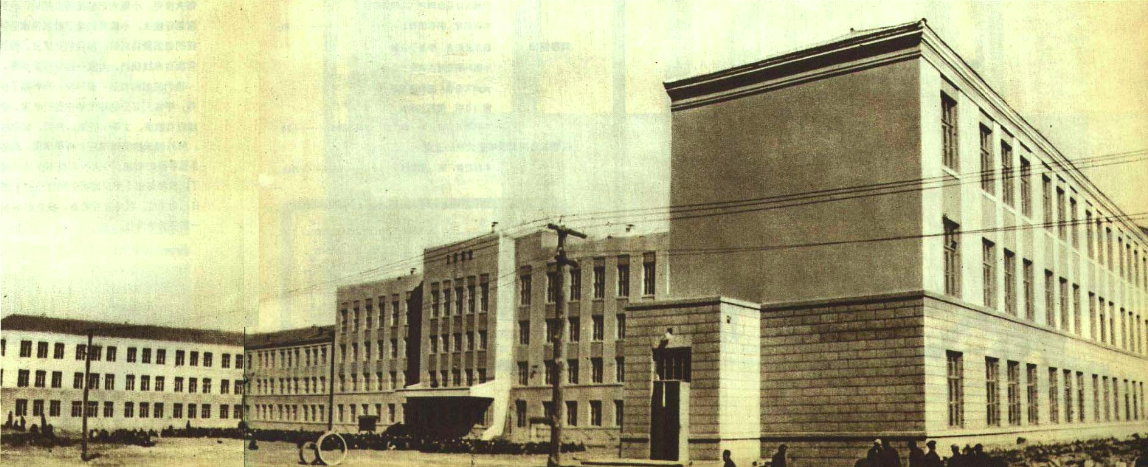 1953年哈尔滨商业中学校